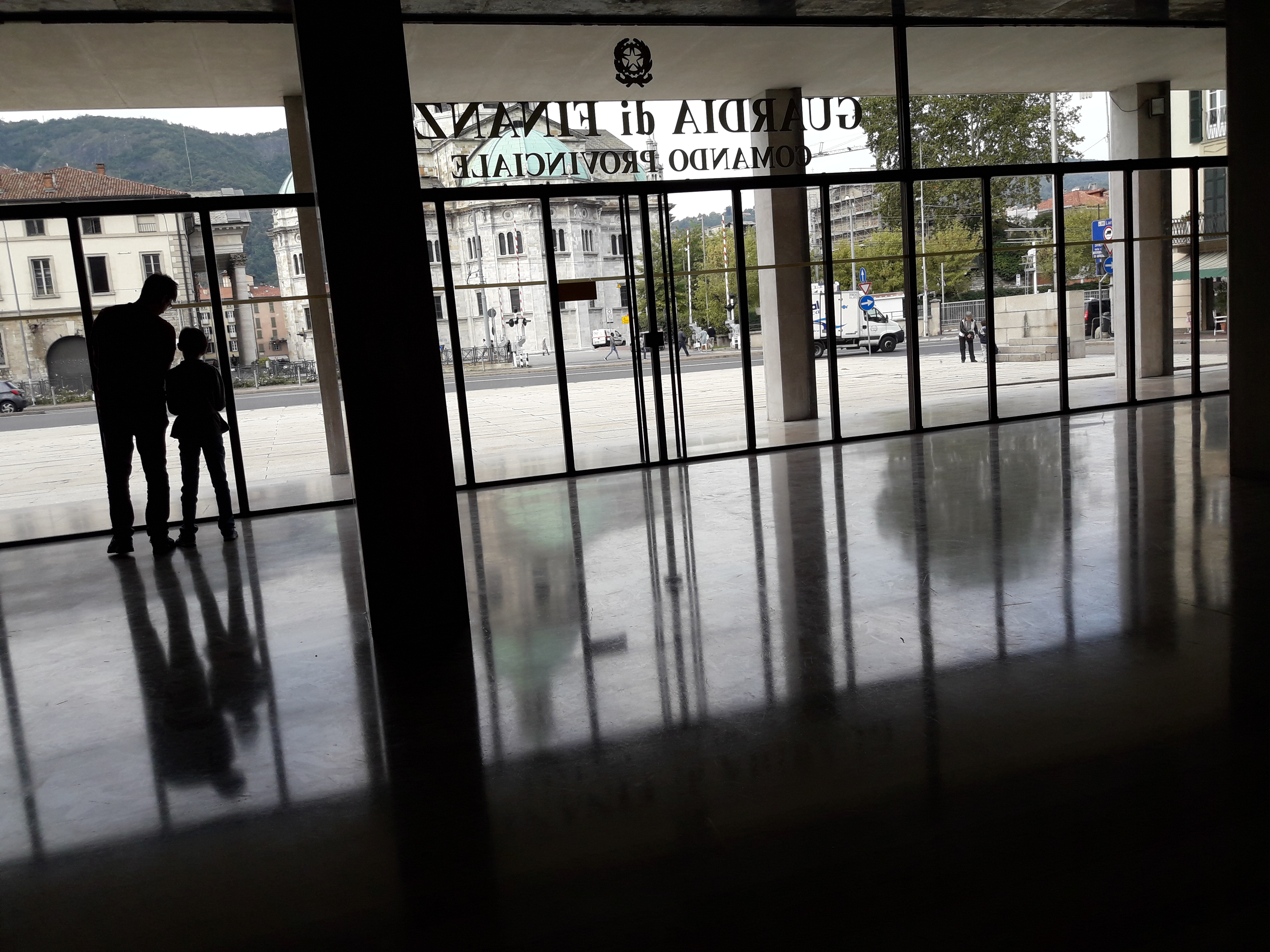 Vetrata facciata Palazzo Terragni, Como This is a photo of a monument which is part of cultural heritage of Italy.